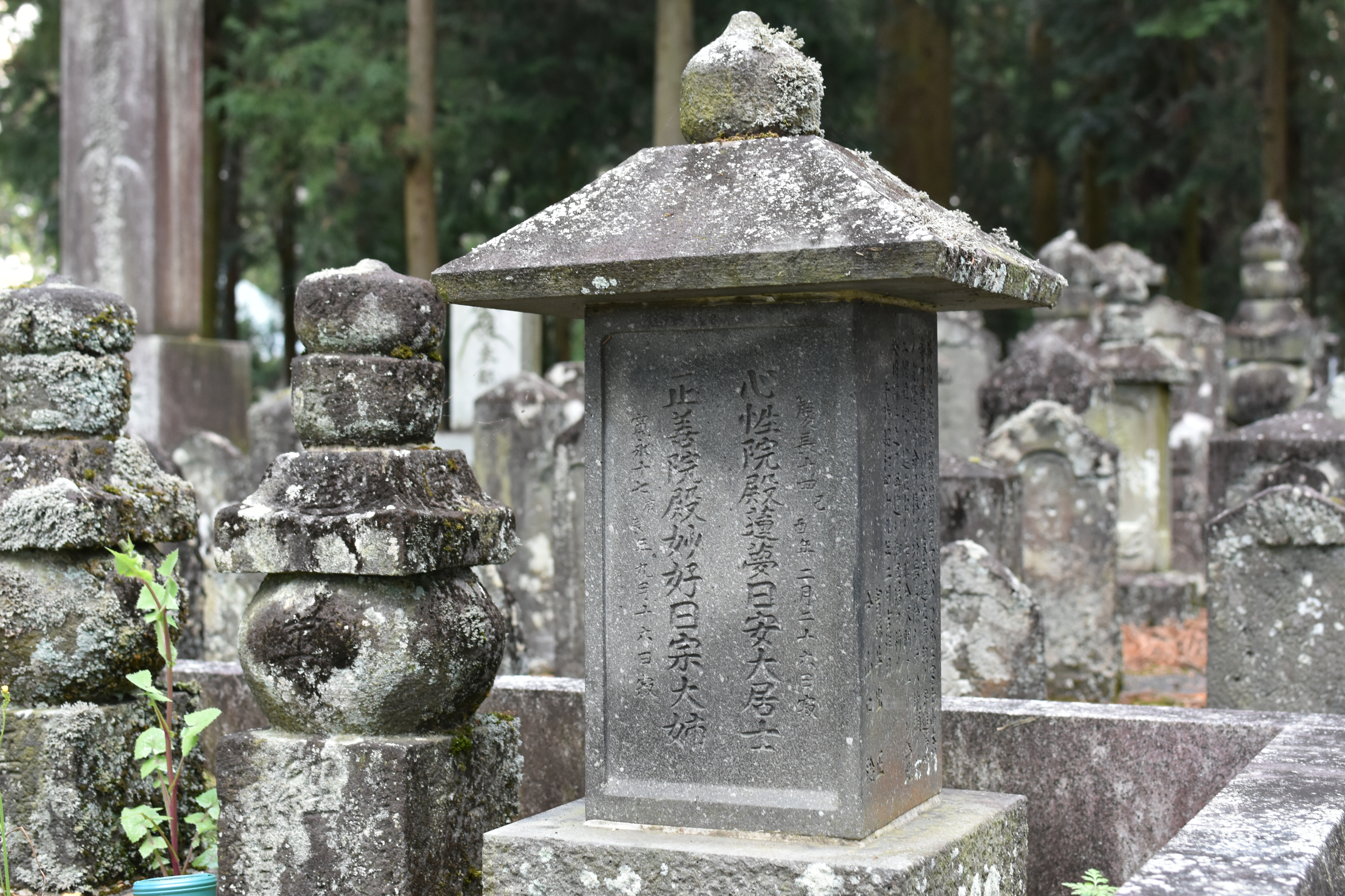 北山本門寺境内にある井出正次の墓碑（静岡県富士宮市）